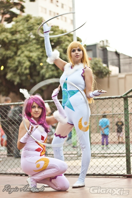 Kaleido Star cosplayers.